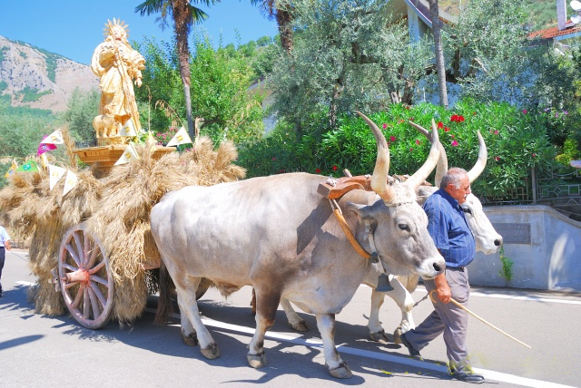 Un momento della processione durante la Festa del Grano di Foglianise (BN)